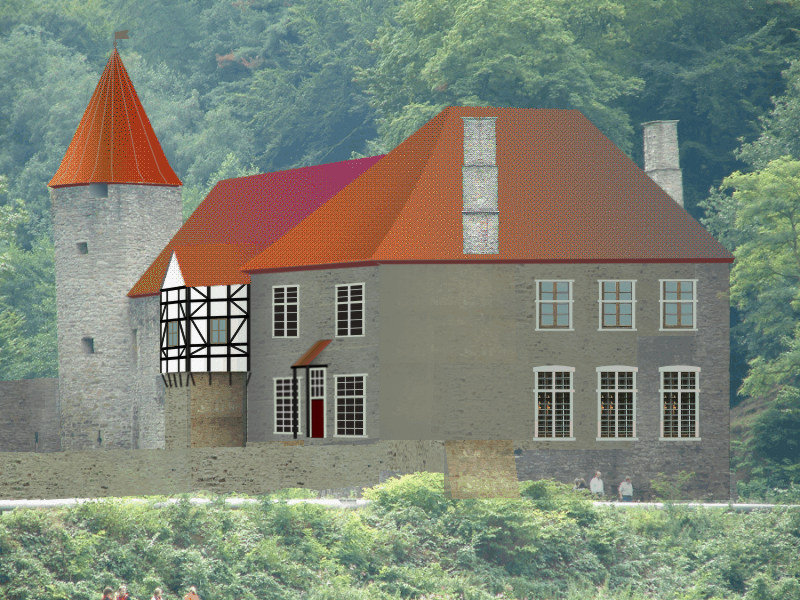 Collage der Burgruine Hardenstein in Witten nach Rekonstruktions-Ansichts-Zeichnungen